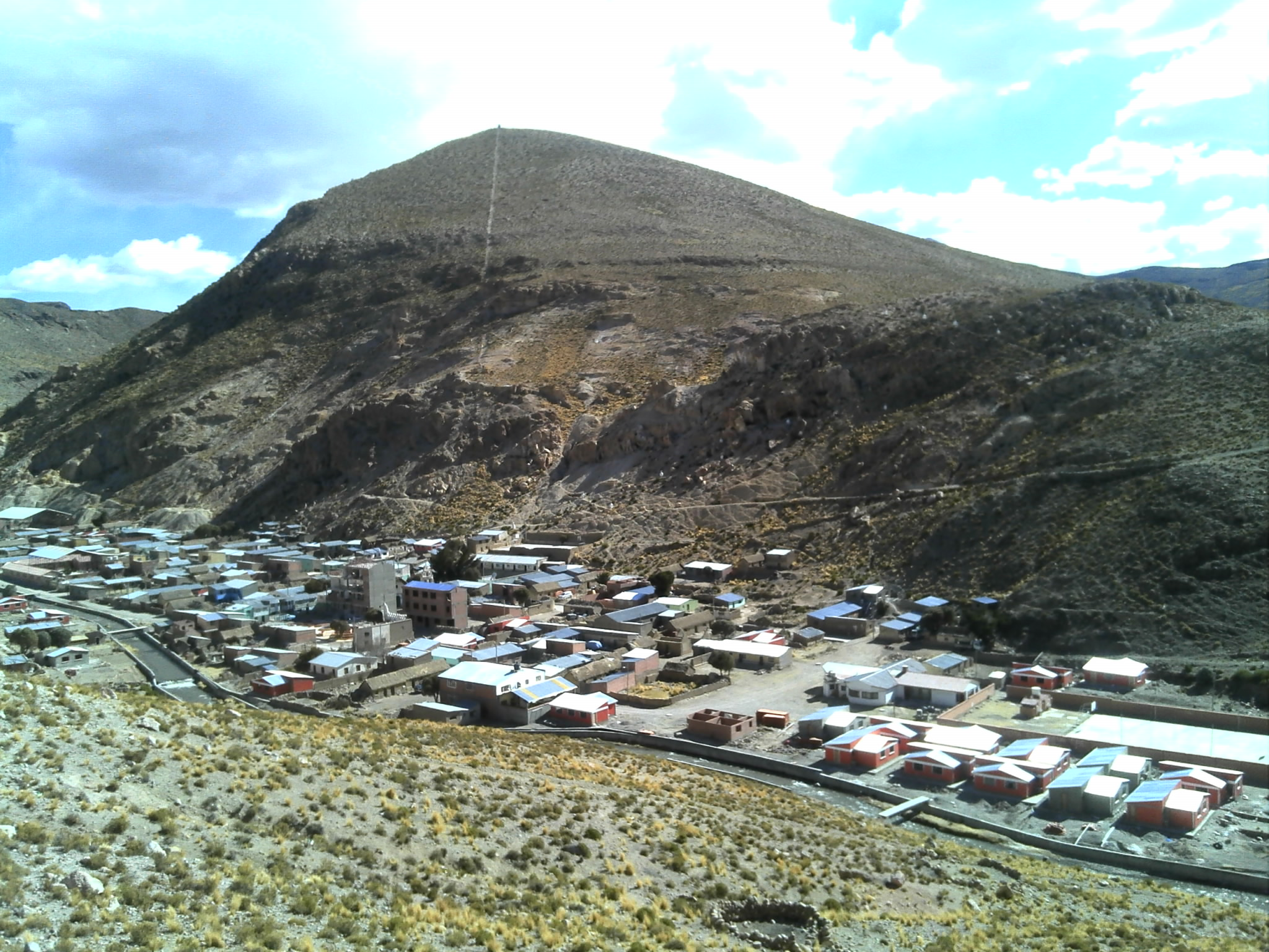 Todos Santos